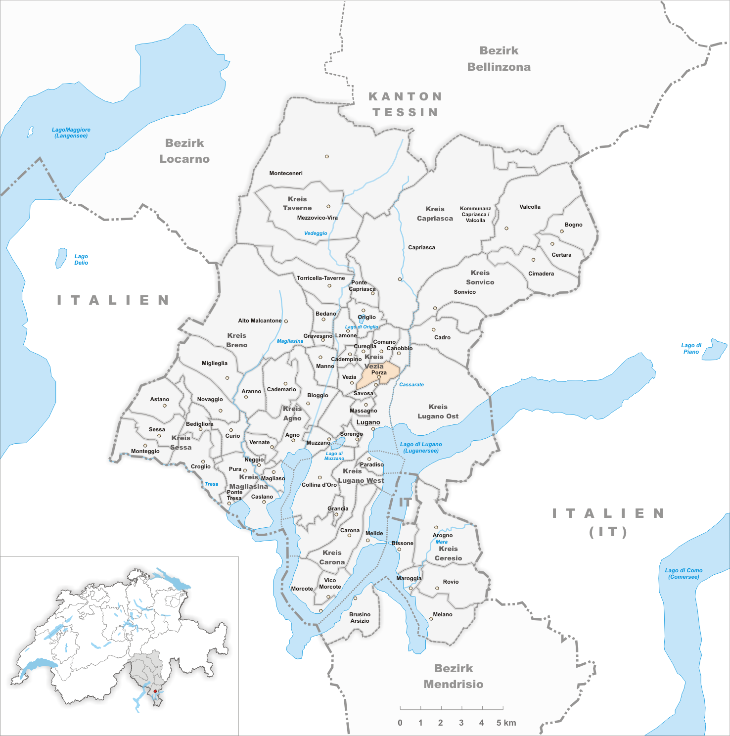 Municipality Porza